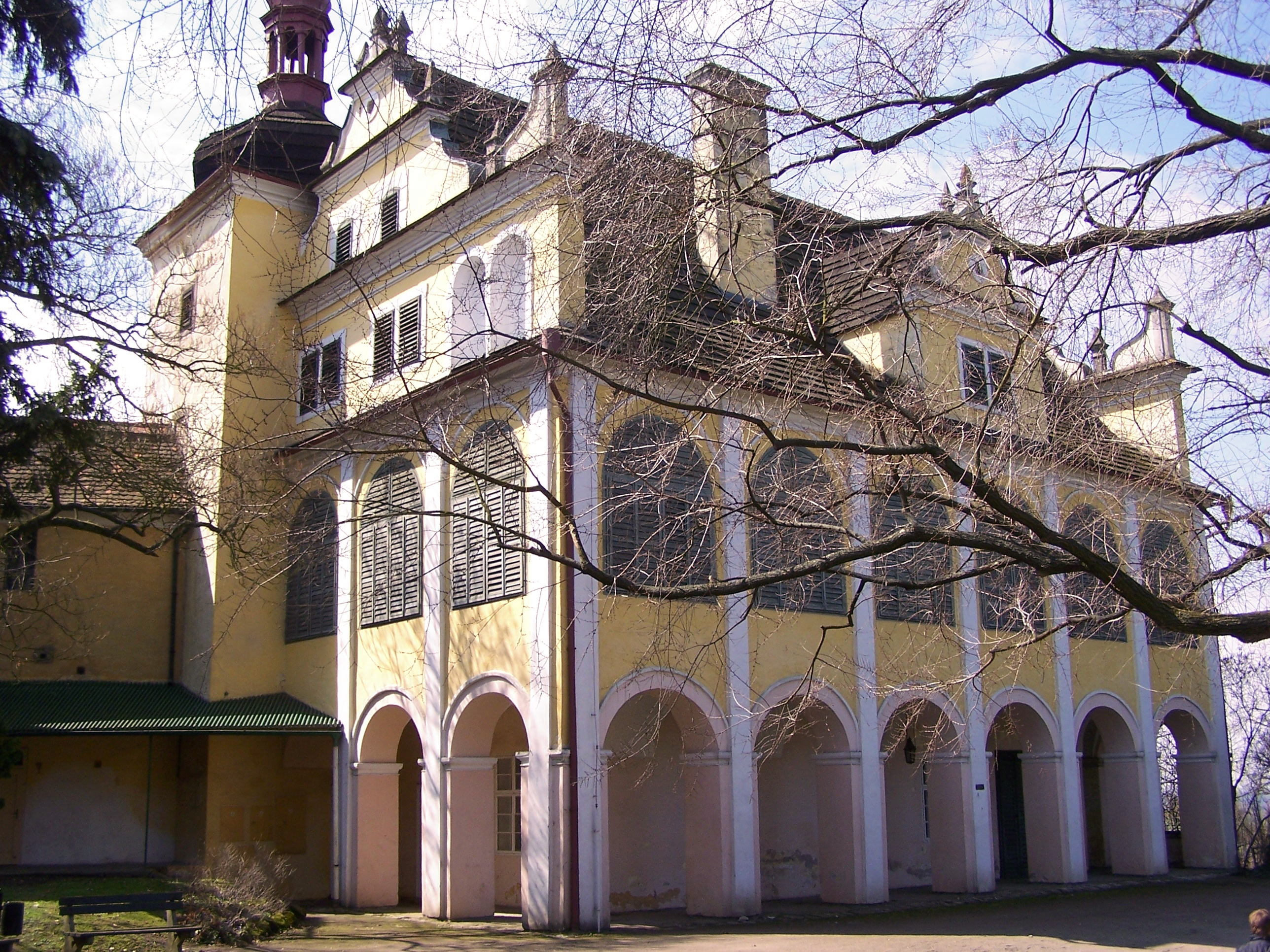 Zámecký letohrádek v Opočně